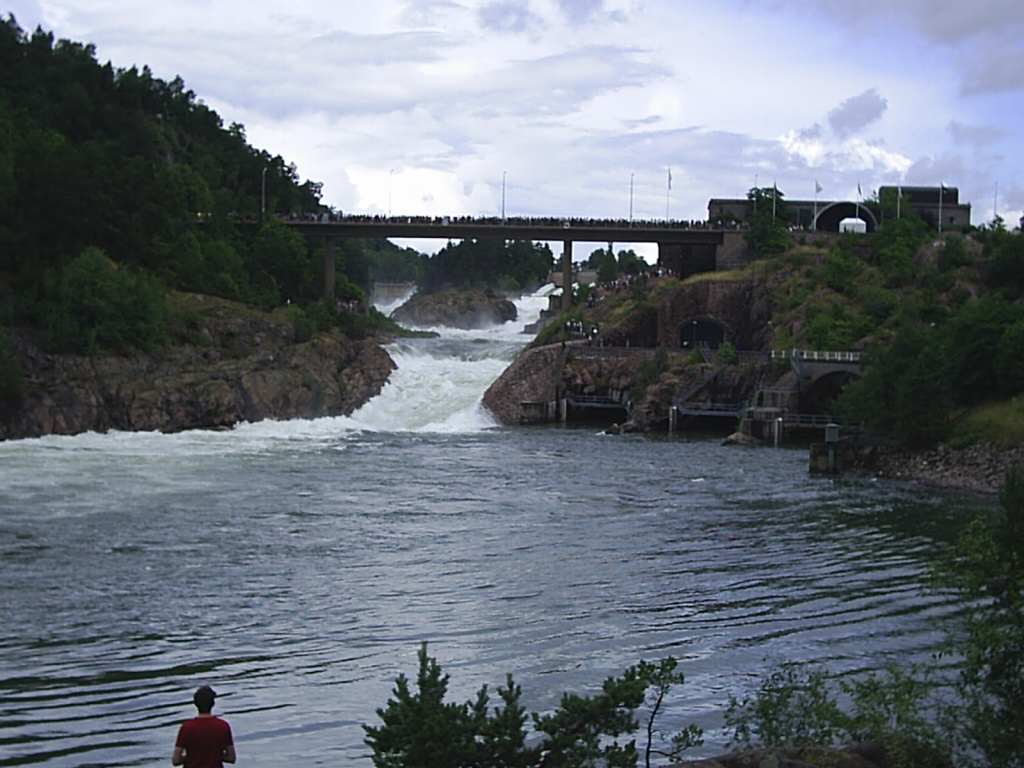 Trollhättefallen, Oscarsbron och Hojums vattenkraftverk. Fotograf:Tubaist